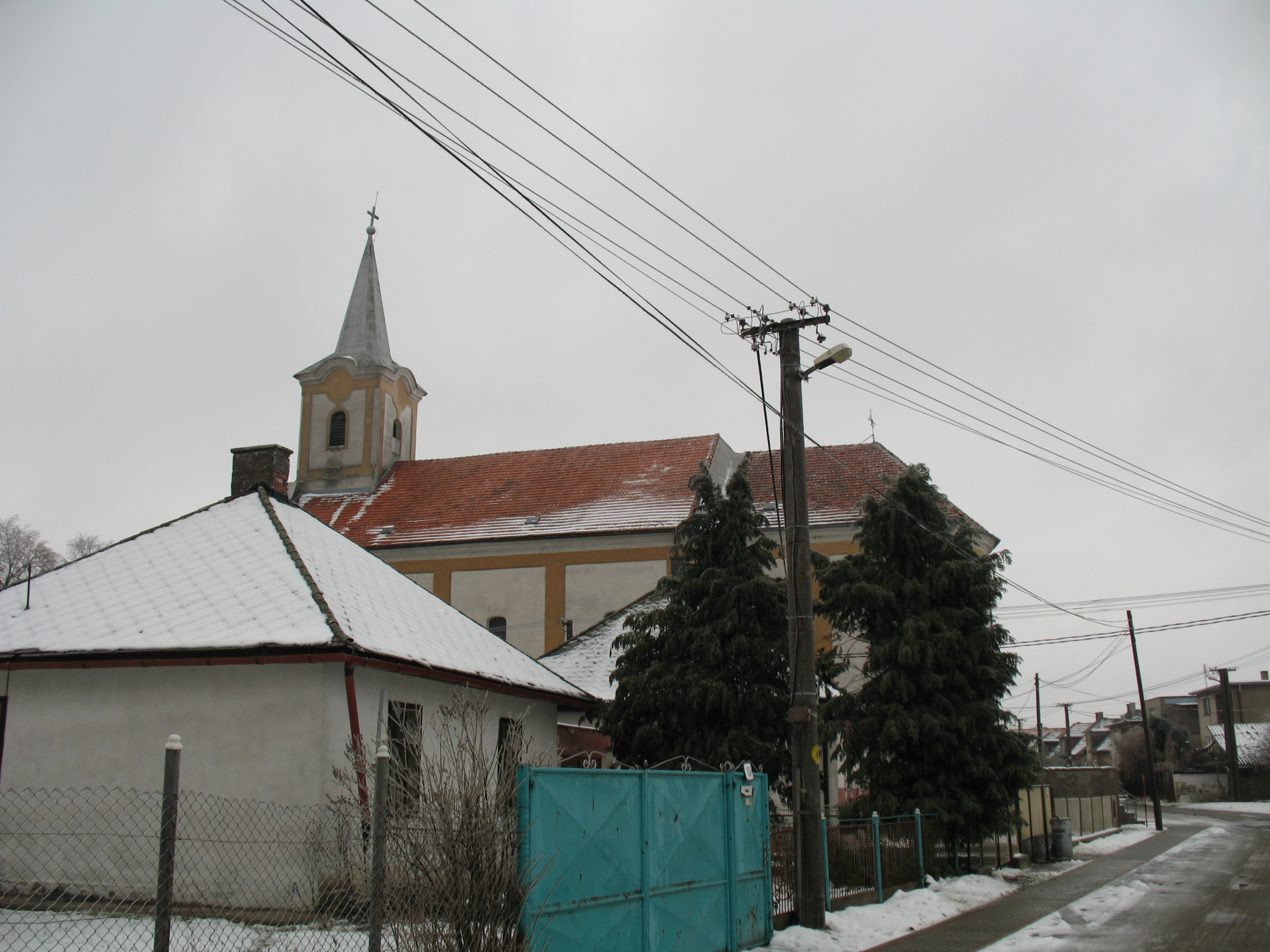 Gyerk